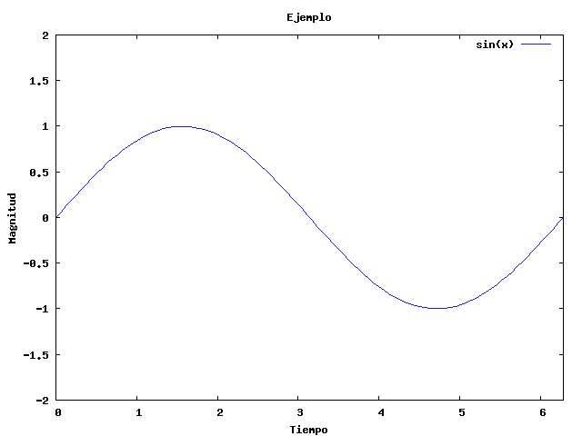 Ejemplo de señal analógica o señal continua. Una magnitud es medida en función del tiempo.